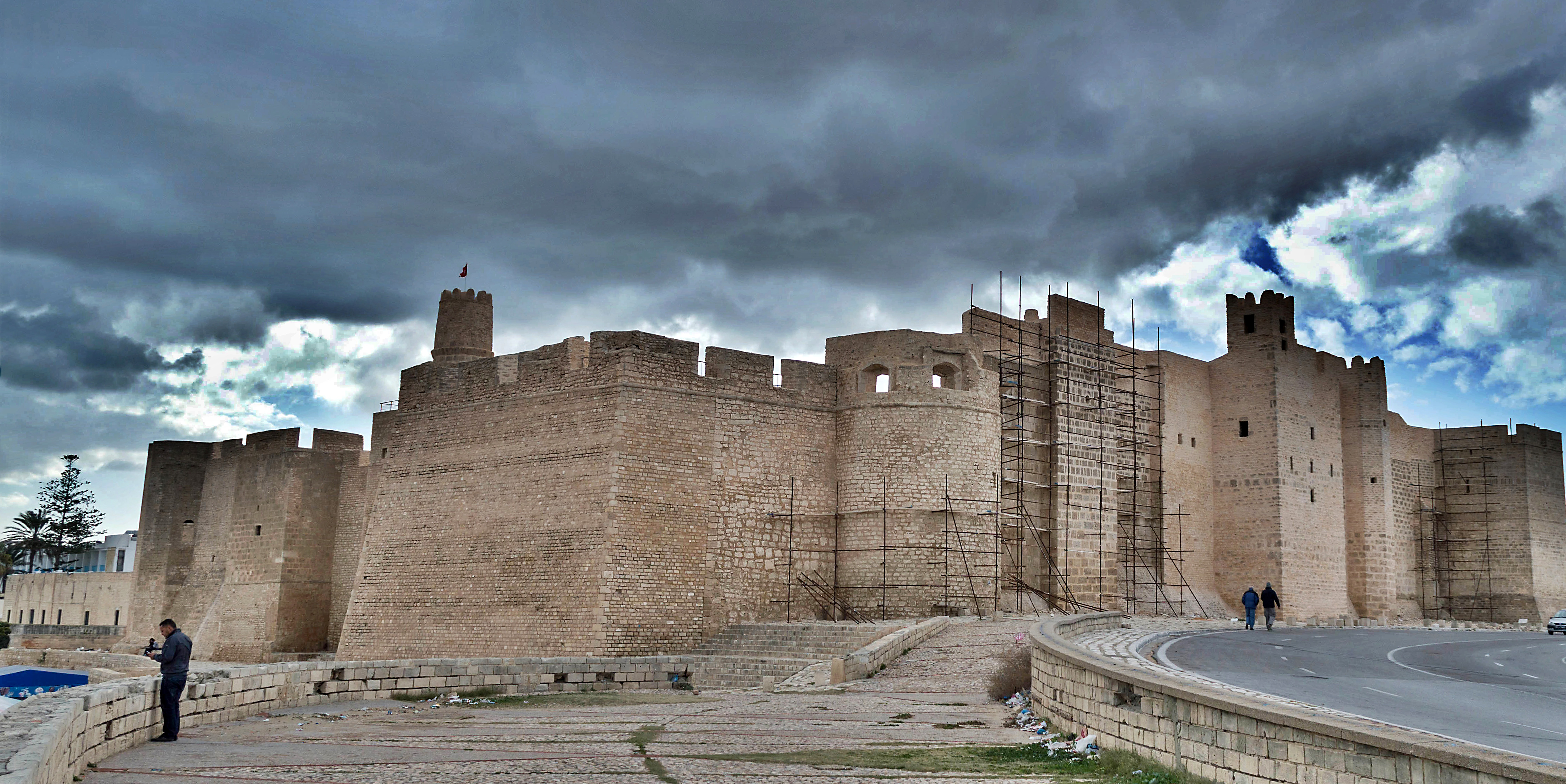 Kasba